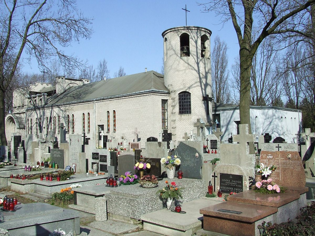 Cmentarz Wolski, Warszawa, kościół cmentarny